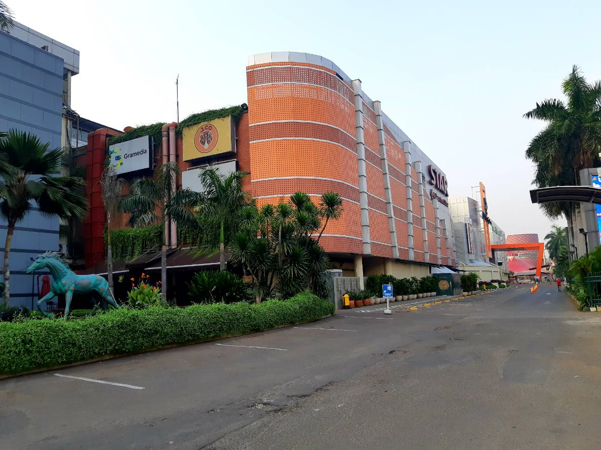 Tampak luar Mall Kelapa Gading 1